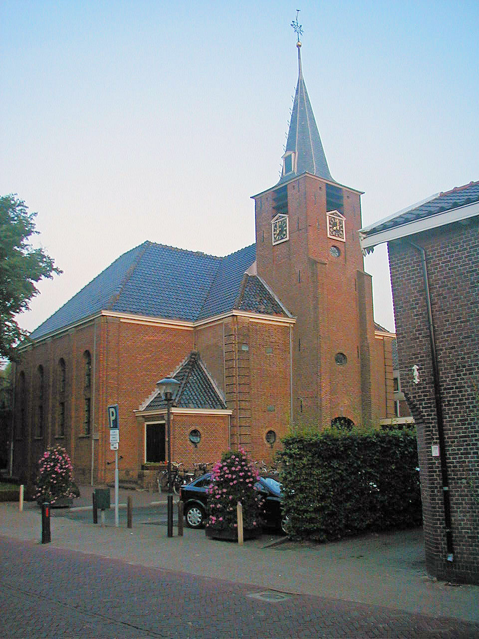 Description Kerk van de Hervormde gemeente Benthuizen; Dorpsstraat 48. De kerk stamt uit nl:1796, de toren uit nl:1650. Volgens licentie; altijd oorspronkelijk auteur vermelden Kerk van de Hervormde gemeente Benthuizen; Dorpsstraat 48. De kerk stamt uit nl:1796, de toren uit nl:1650.